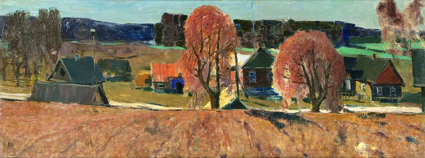 Борис Аракчеев, «Поздняя осень», 1963, холст, масло, 71 x 188 см